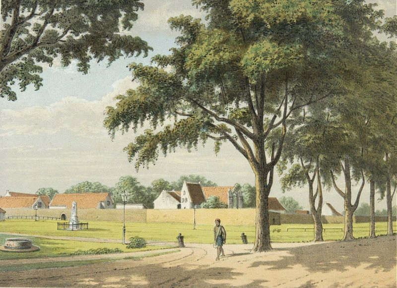 Litho. Kleurenlitho naar een oorspronkelijke tekening van J. Rappard.. Het fort Rotterdam in Makassar